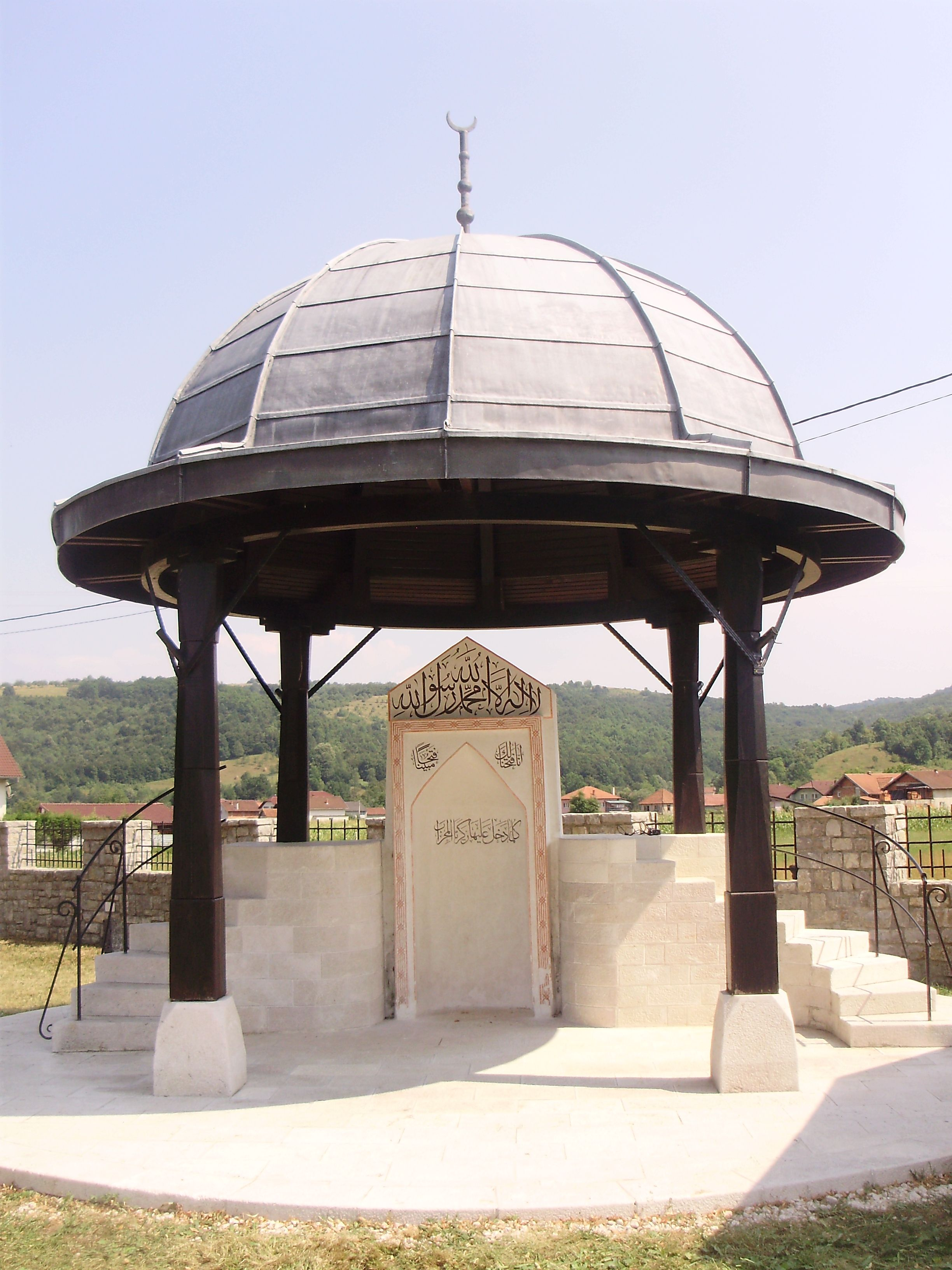 Fatihova Musalla u Donjem Kamengradu (Sanski Most).